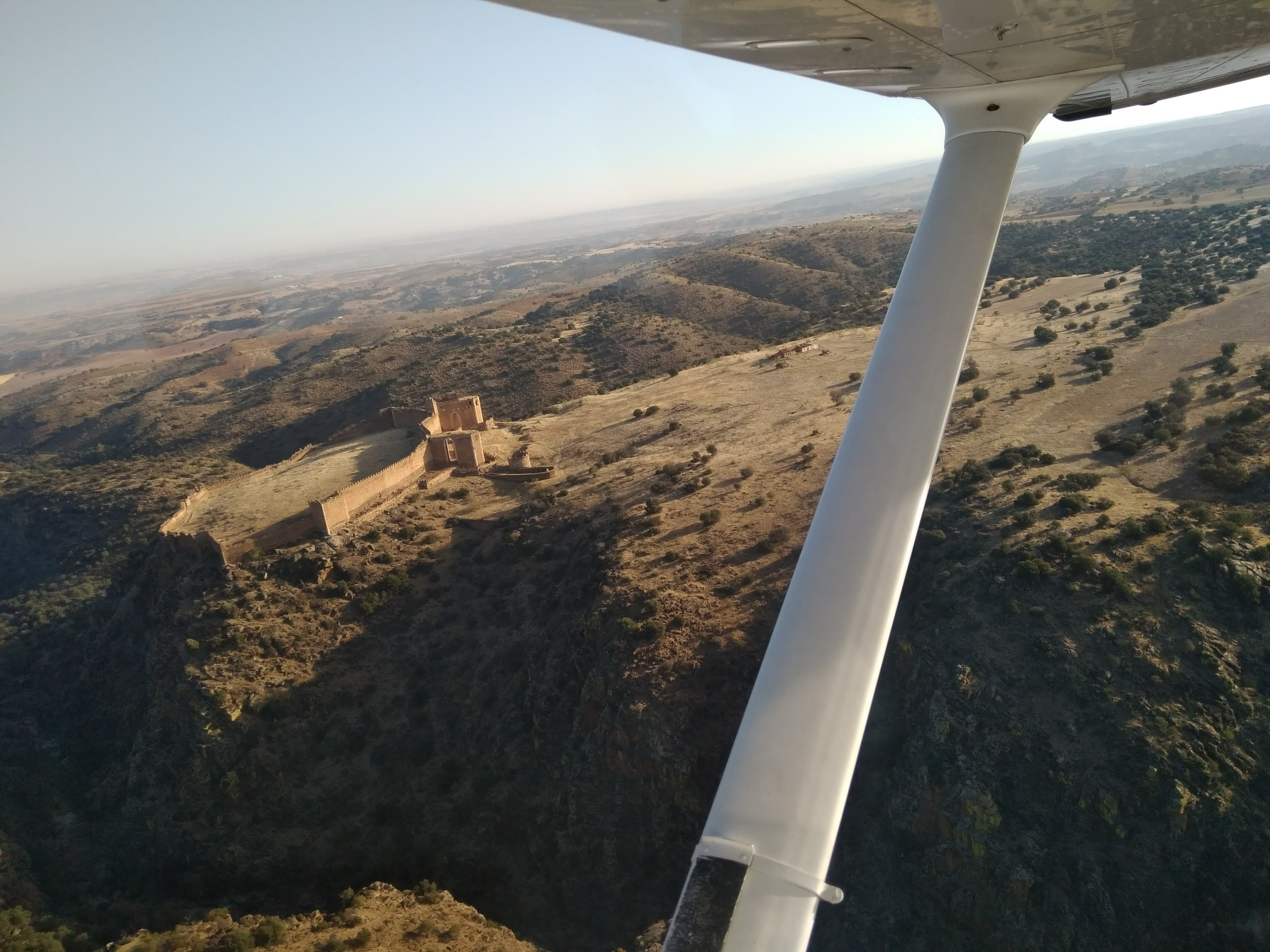 Vista aerea del Castillo de Montalbán